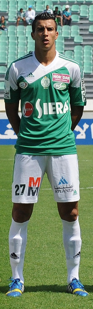 إسماعيل بلمعلم